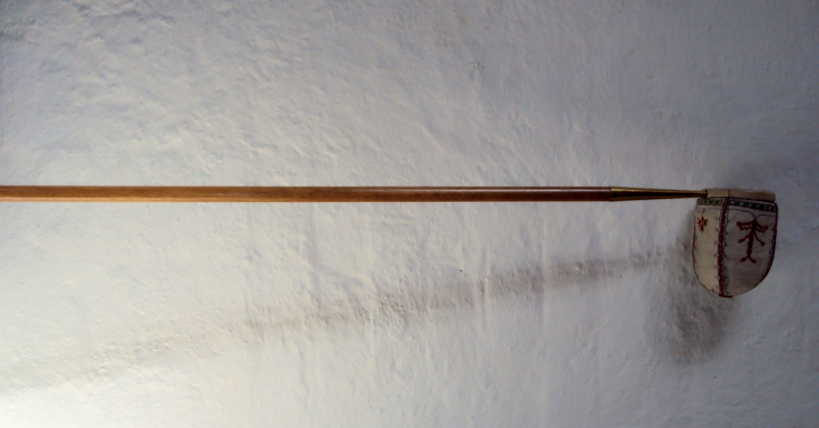 Kollektstav i Fru Alstads kyrka